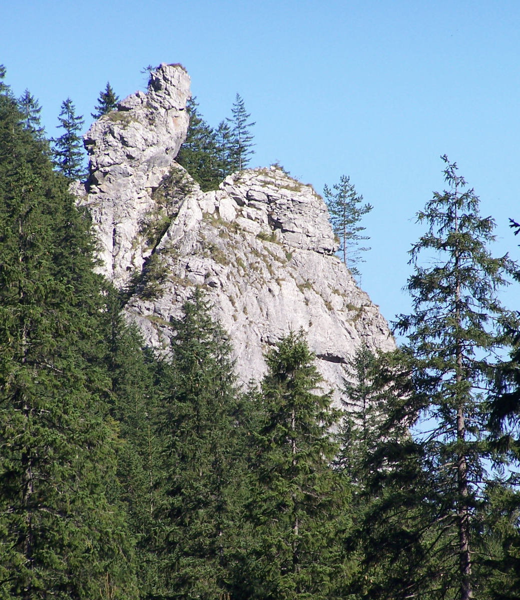 Skała Sowa (Dolina Kościeliska